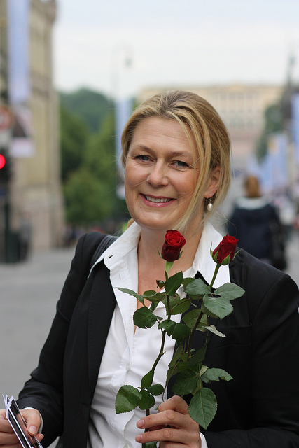 Gina Lund